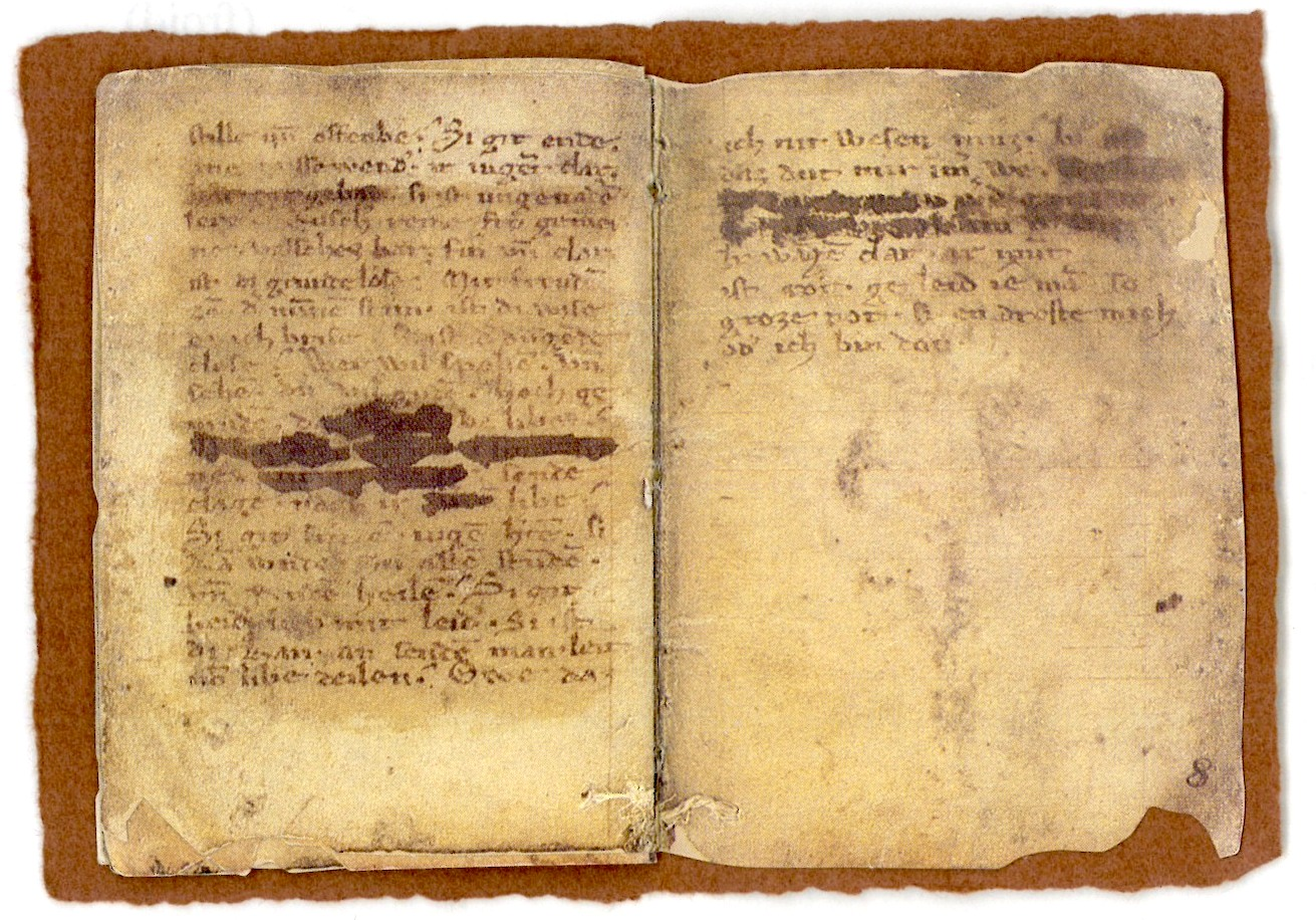 Zürcher Liebesbriefe; last page, 10.5x 7.3 cm, (Faksimile)